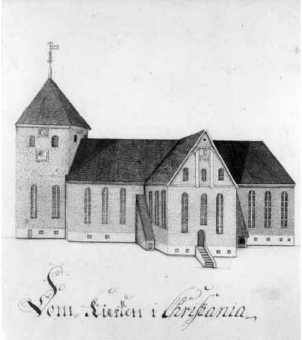 Oslo domkirke tegnet av Gerhard Schøning. Før ombyggingen på 1850-tallet.